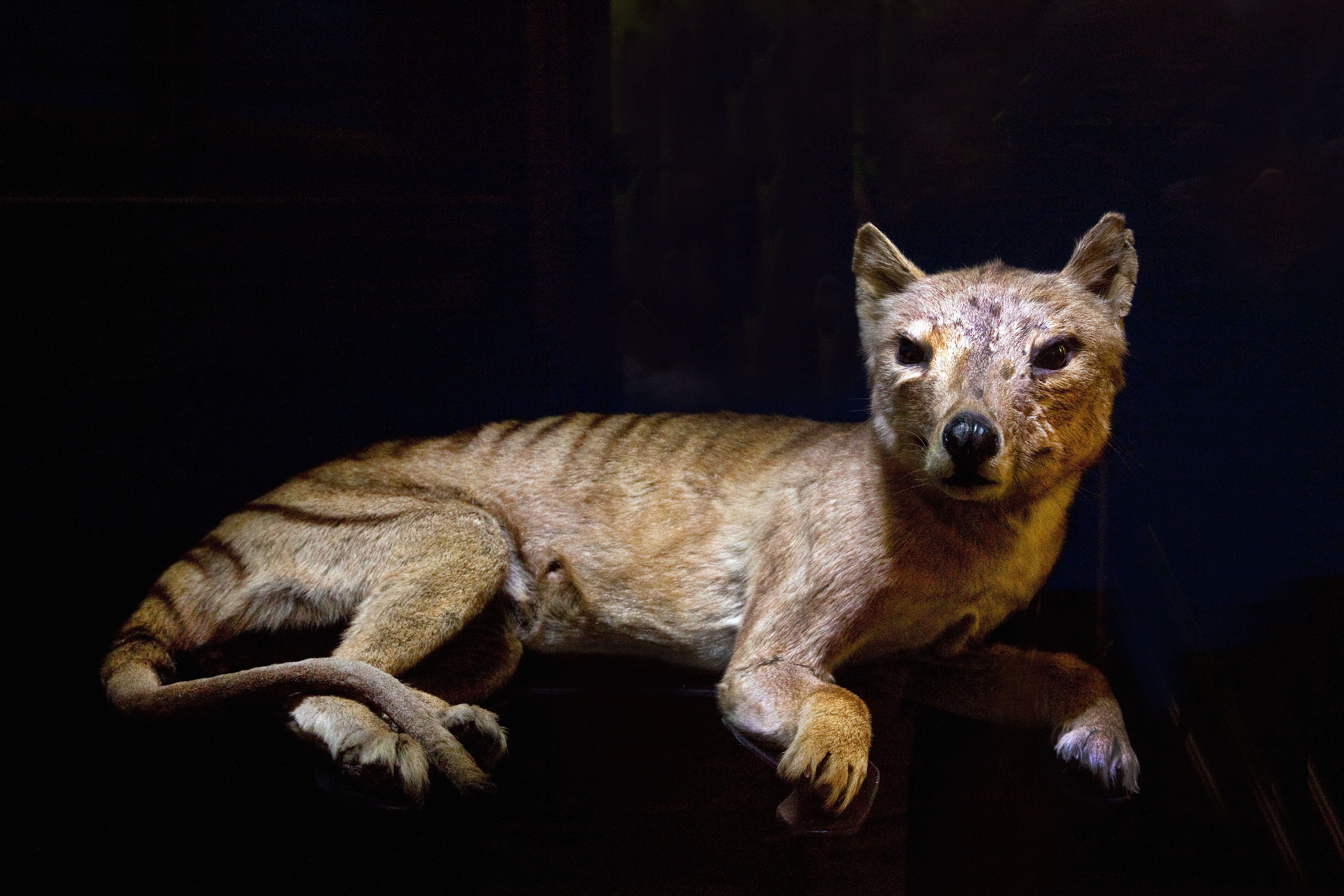 Tasmanischer Tiger im Naturhistorischen Museum in Wien